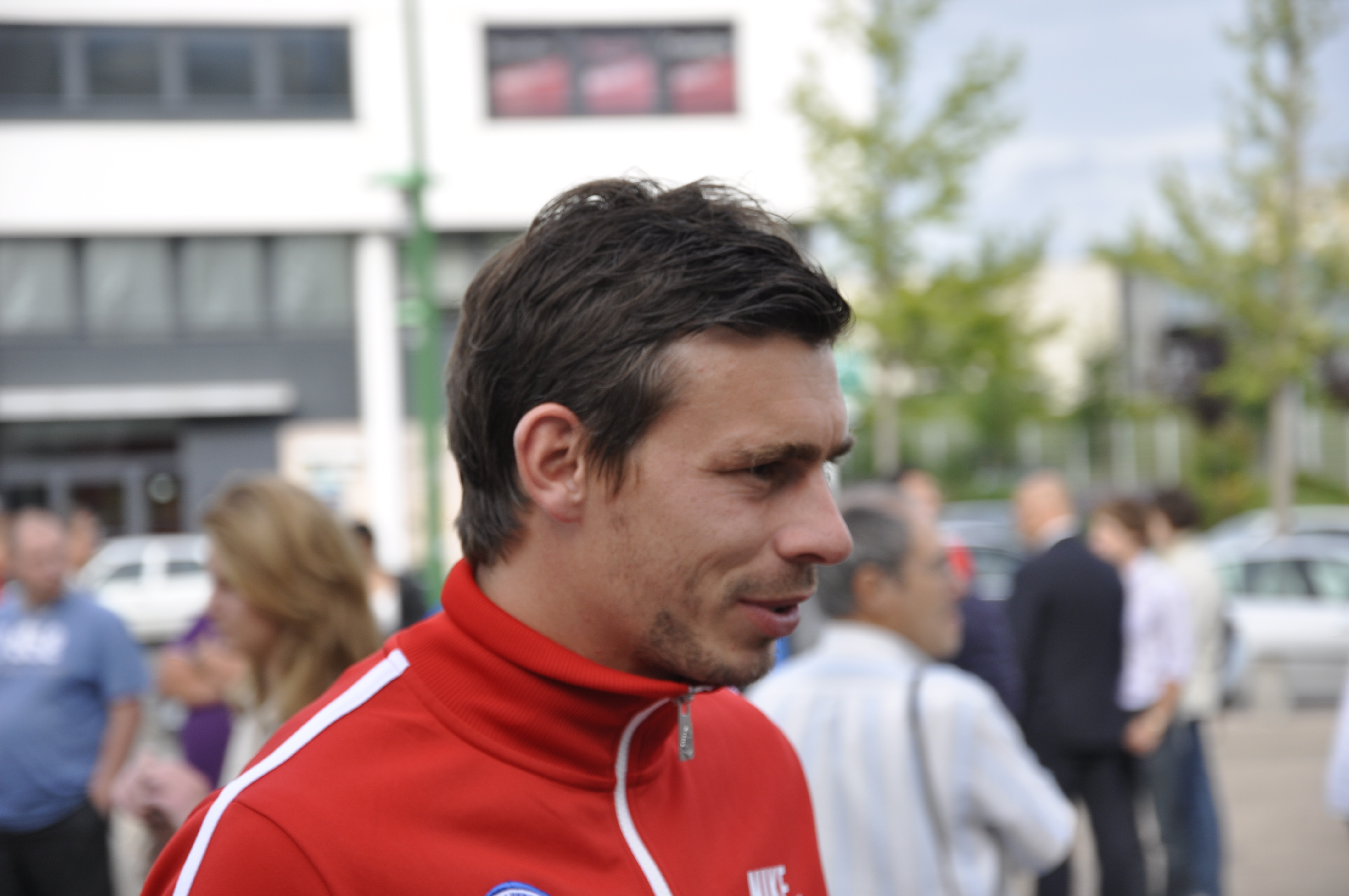 Romain Poyet lors de la présentation des recrues de Caen.